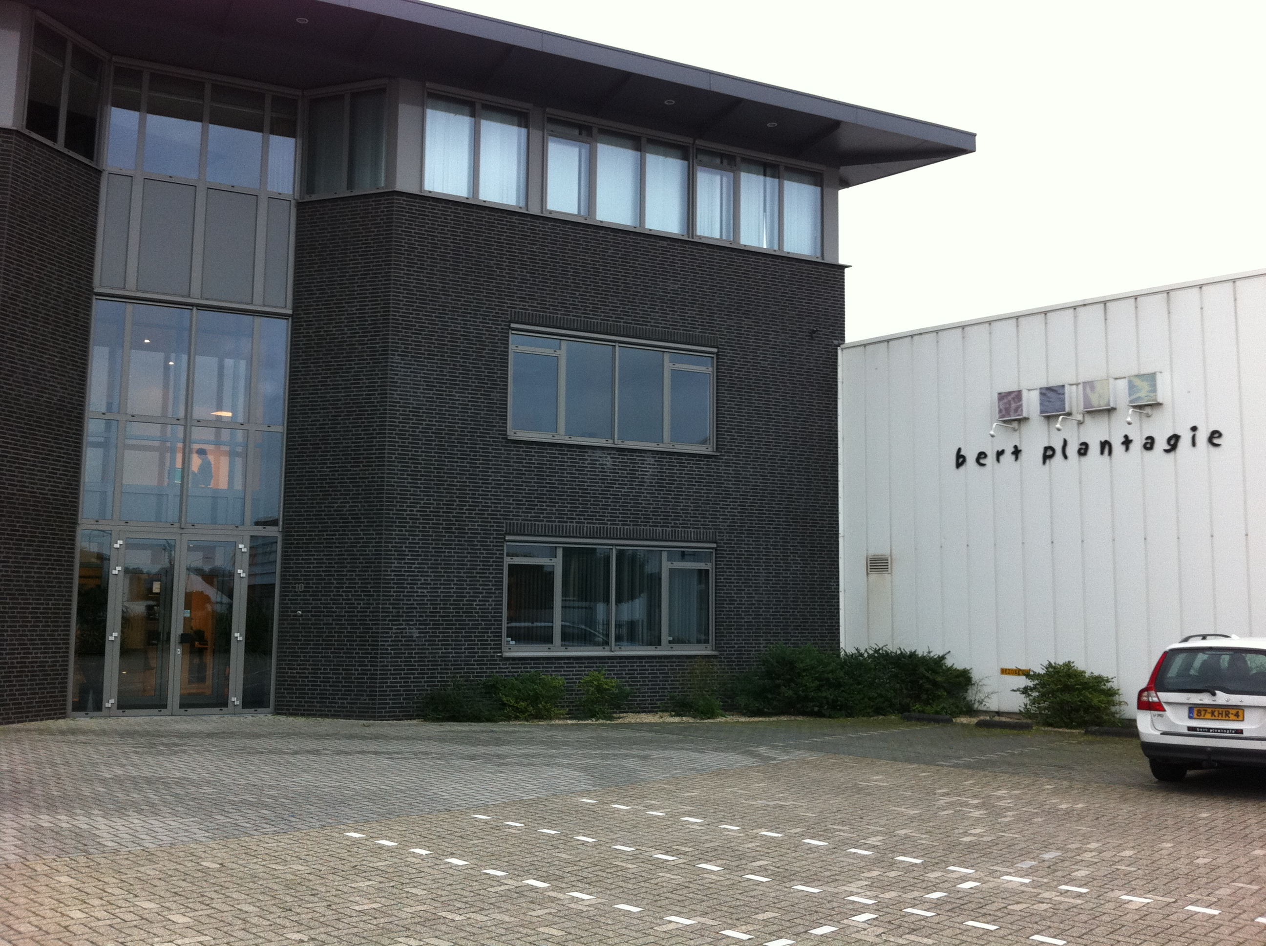 Hoofdkantoor Bert Plantagie